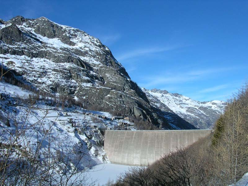 Diga del Lago di Beauregard in inverno. Valgrisenche, Valle d'Aosta, Italia.